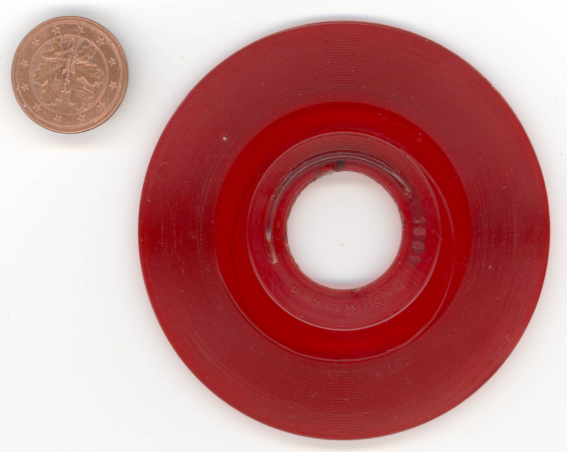 Schallplatte für redende Puppe im Vergleich zu einem Euro-Cent, disk for a speaking doll, compared to an Euro-Cent